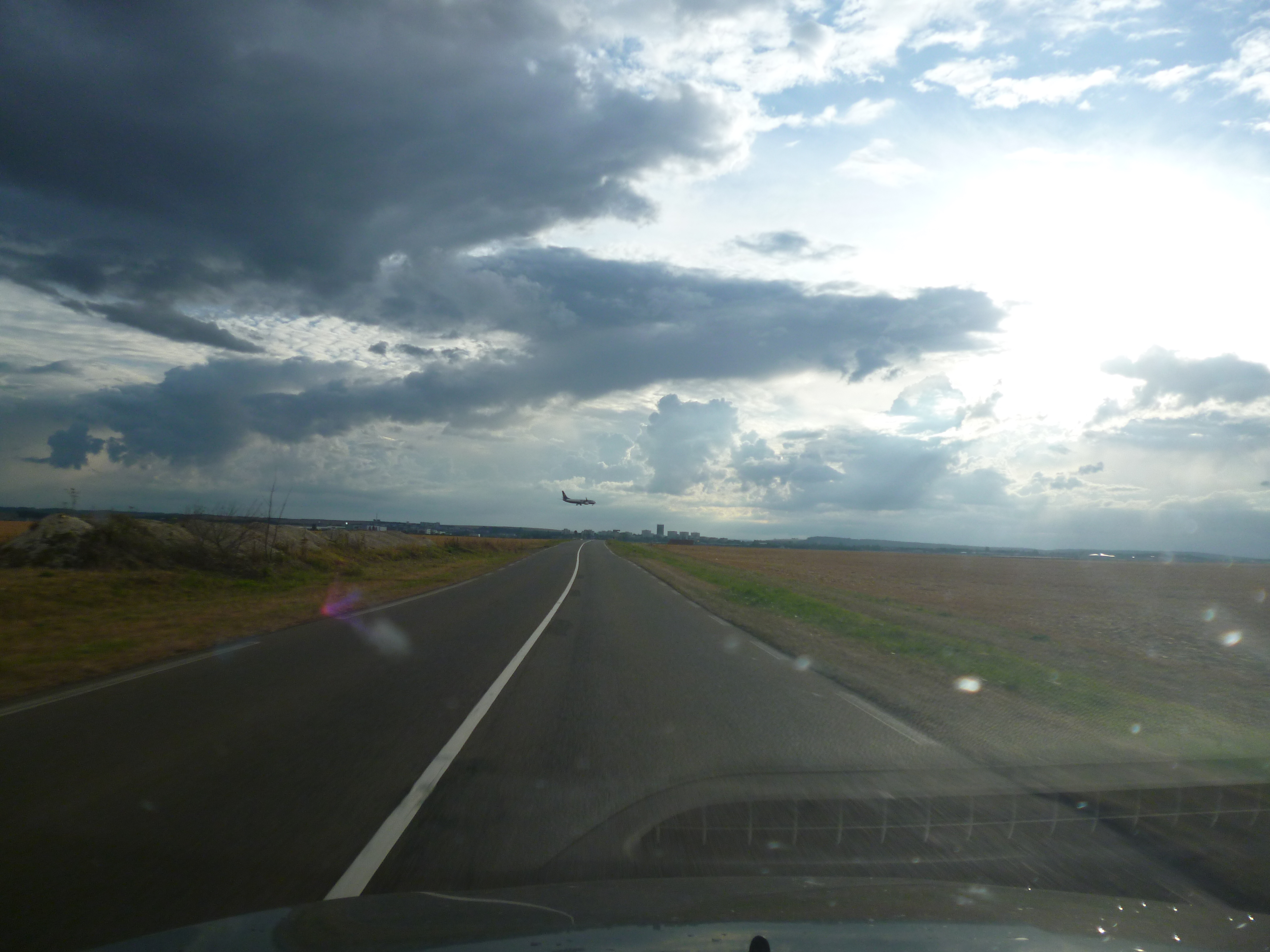 Atterrissage d'un avion sur la piste principale de l'aéroport de Beauvais-Tillé (Oise).